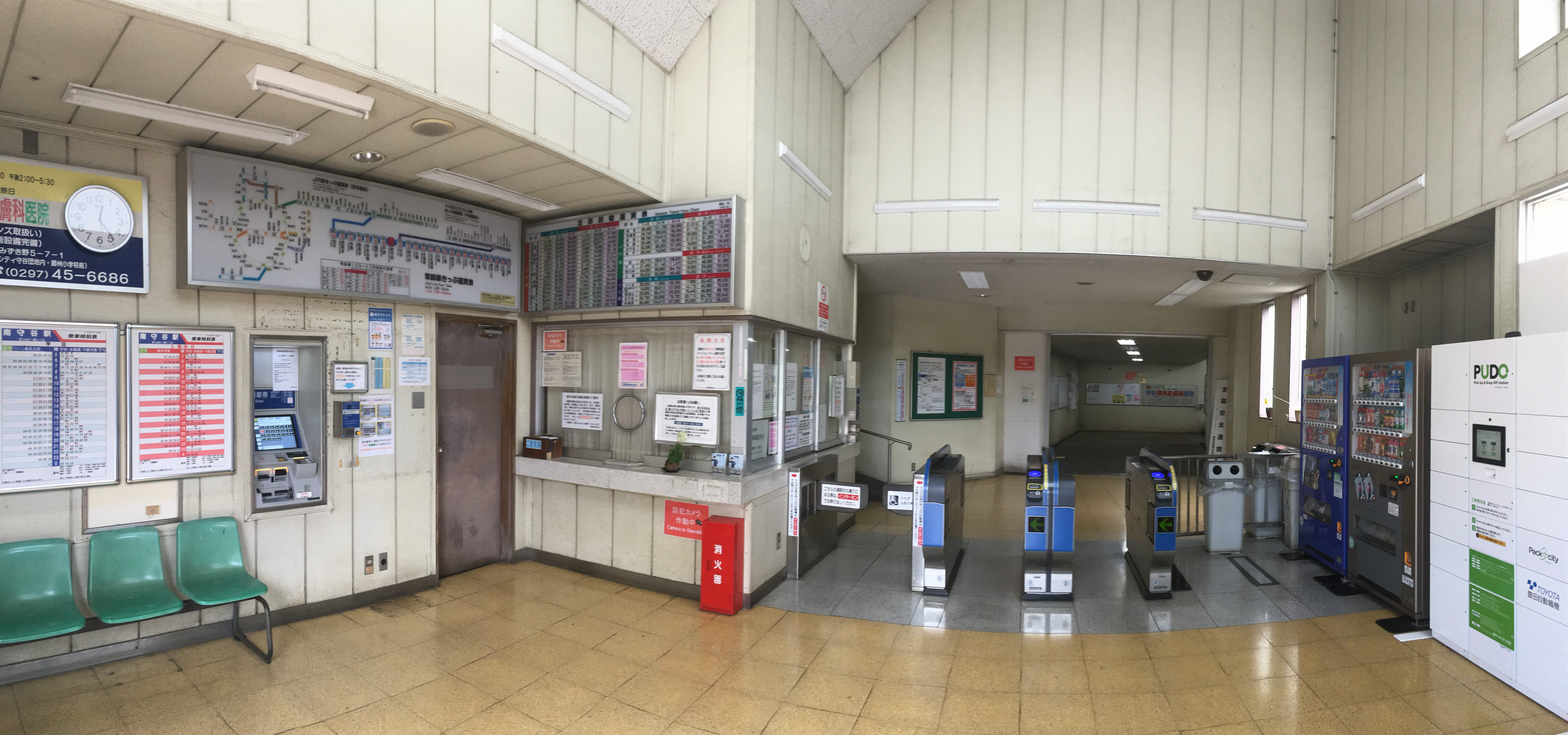 Minami-Moriya Station (南守谷駅)